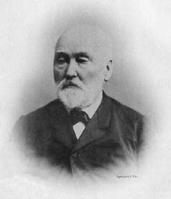 French economist Jean-Gustave Courcelle-Seneuil (1813-1892)